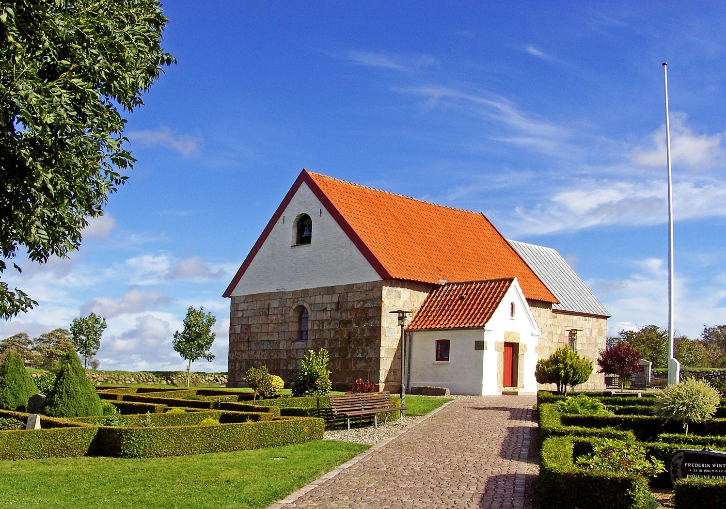 fra sydvest